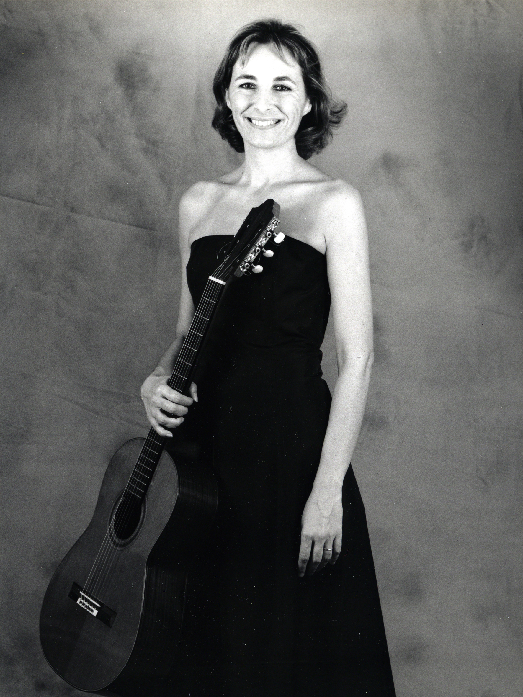 Couverture